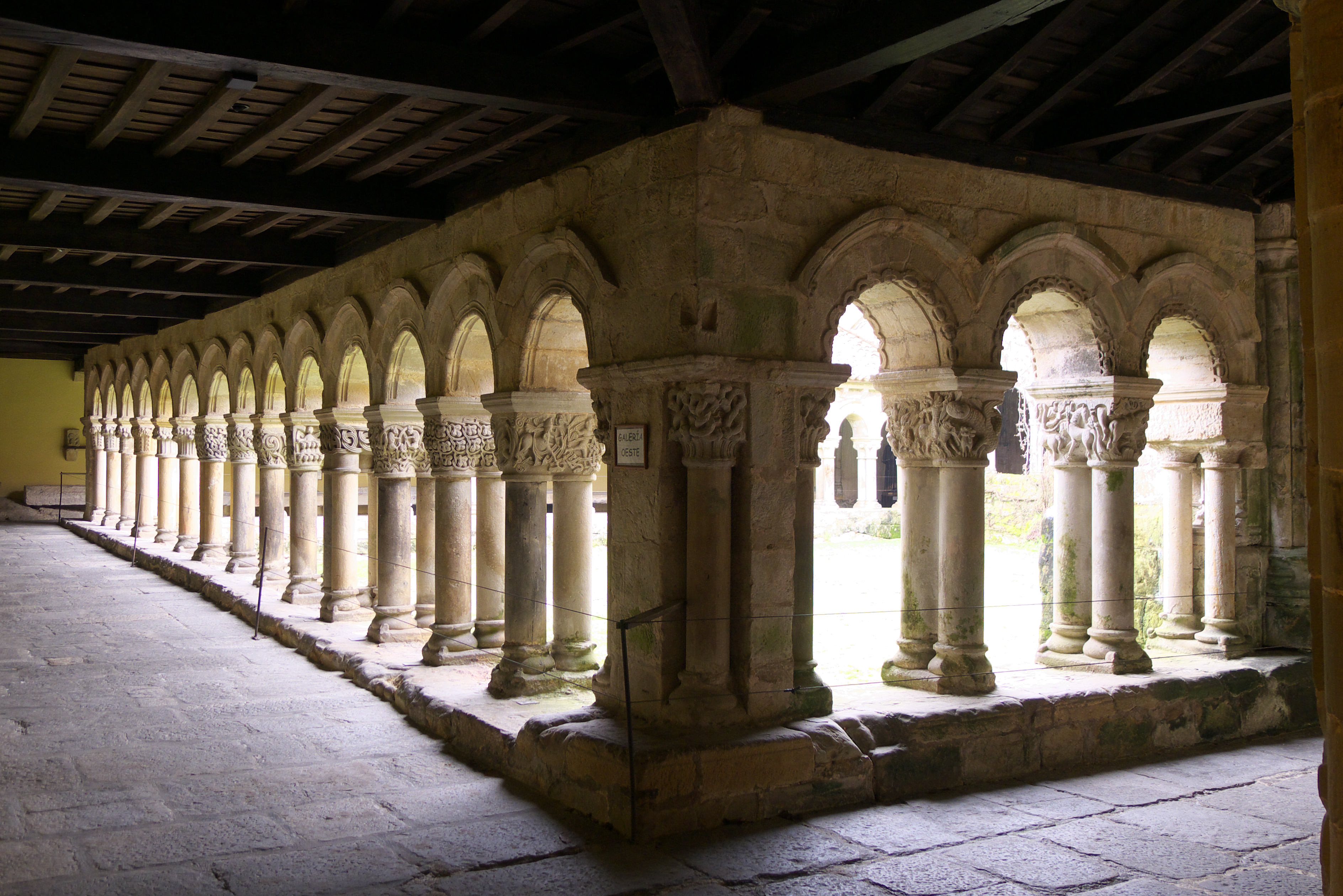 Entre los más representativos del románico español. Situado al norte de la iglesia, presenta una escultura románica, con influencia de Silos, de primer orden.